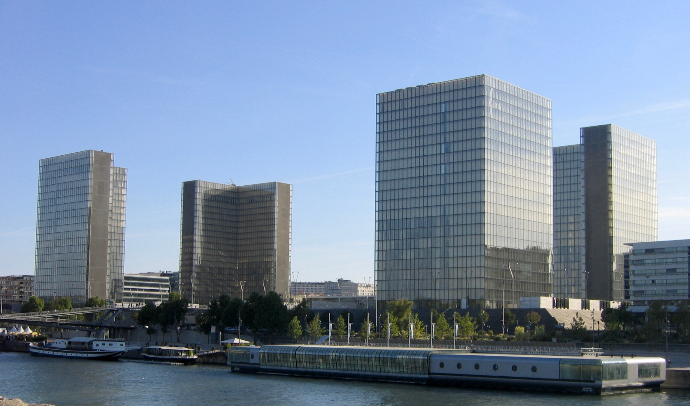 Recadrage de